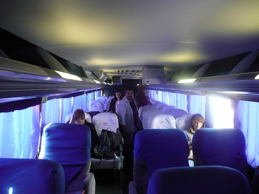 Interior de una unidad Ejecutivo Plus Ejecutivo